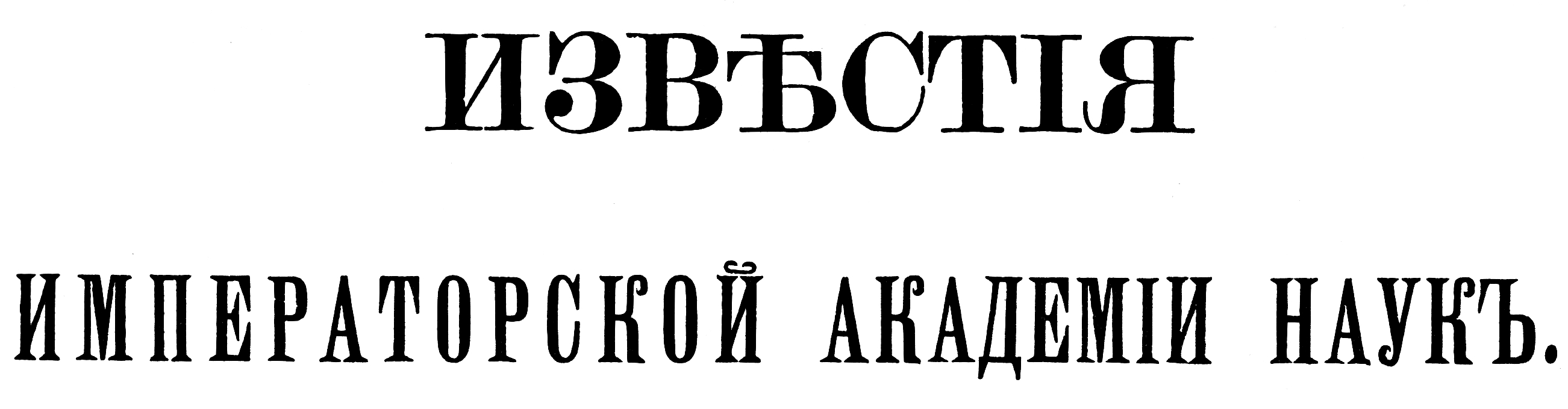 Титульный лист Известий ИАН